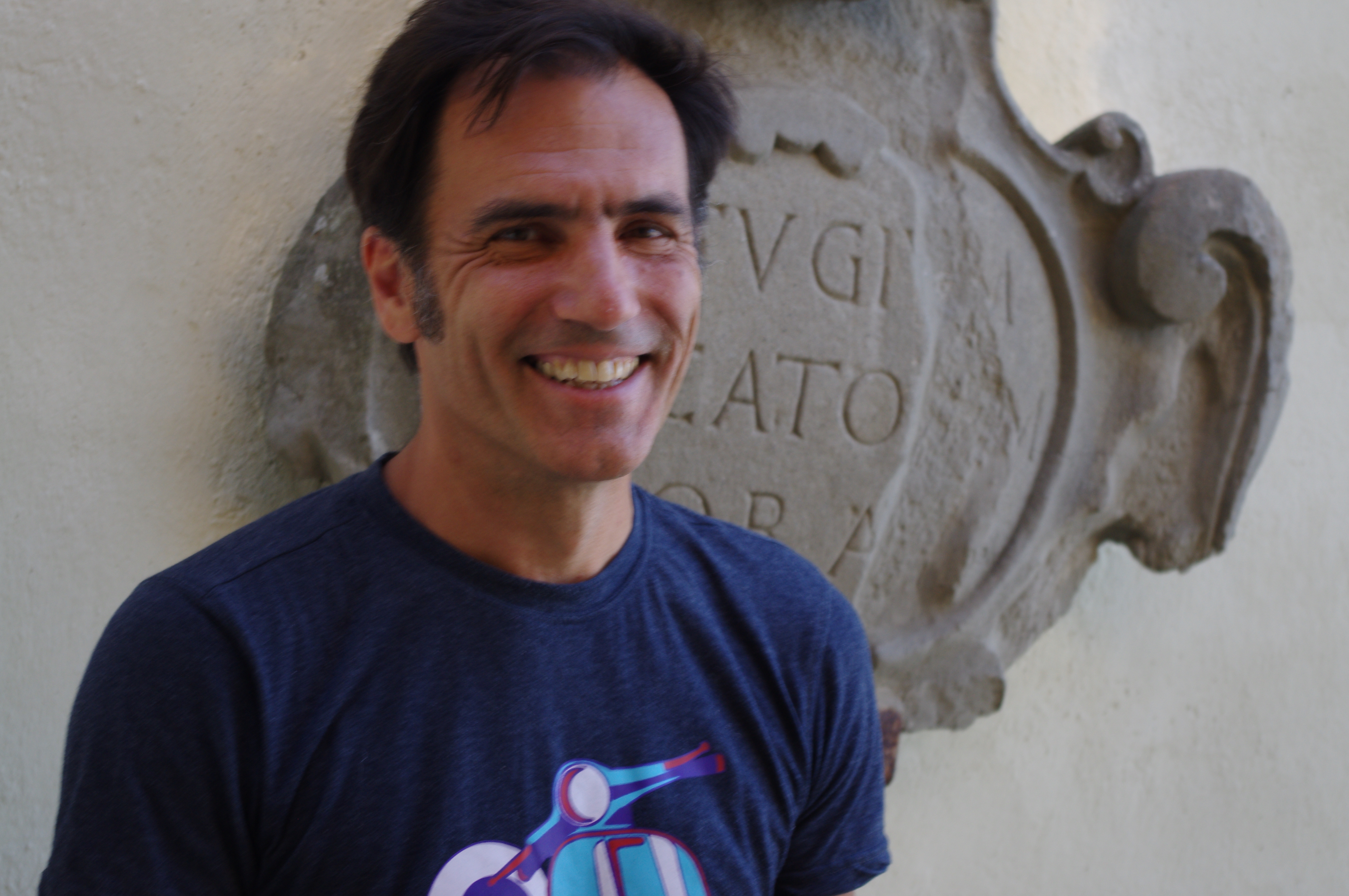 Der Buchautor Carlos Rodrigues Gesualdi